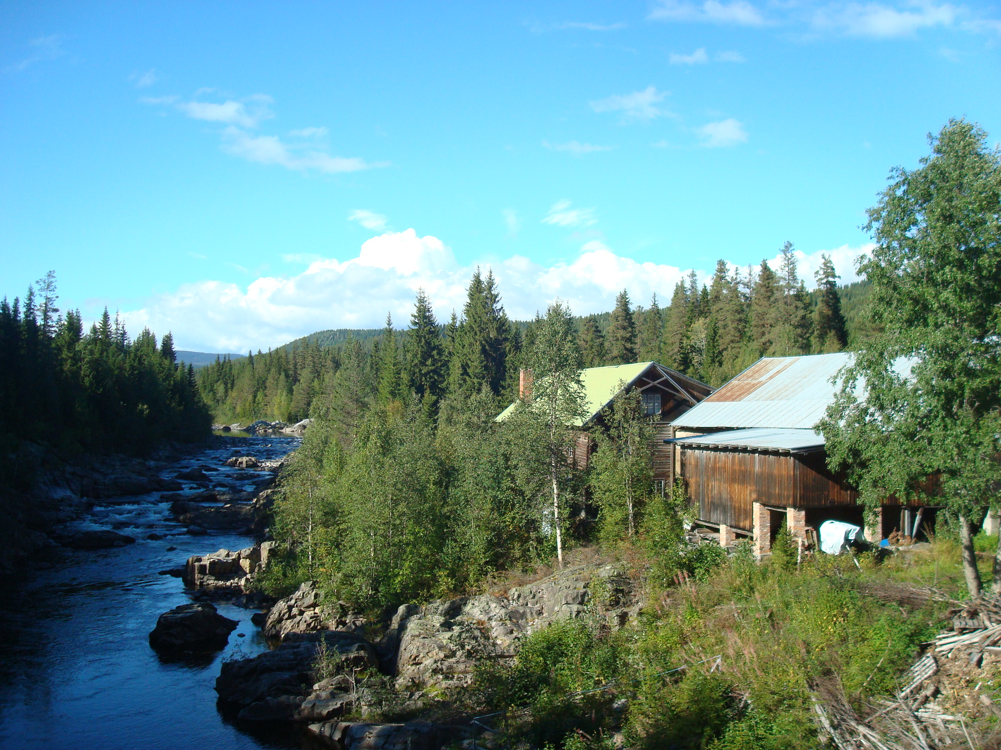 Grønvold sag og mølle i Torpa